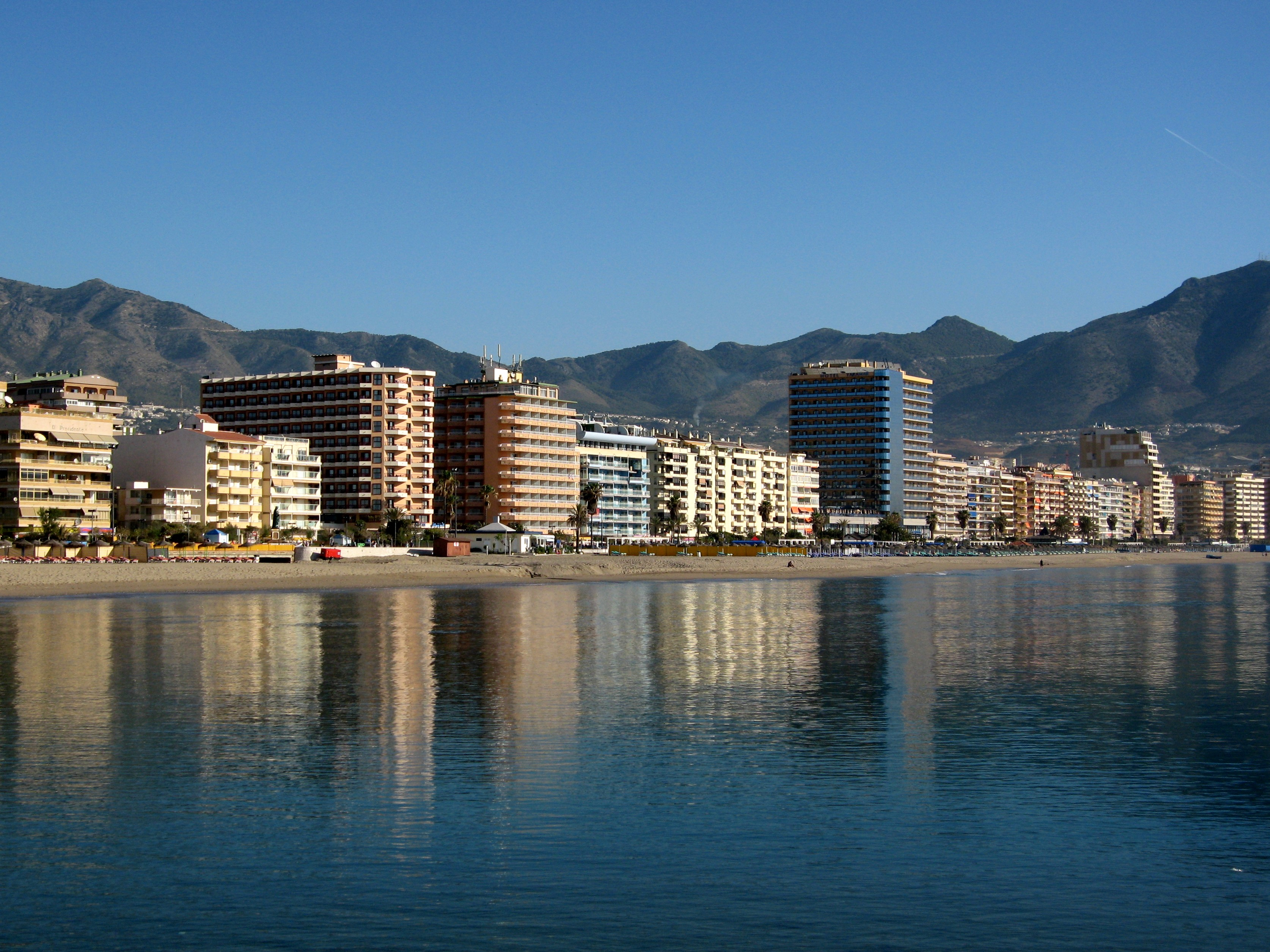 Strand von Los Boliches / Playa de Los Boliches, Fuengirola, Provinz Málaga, Andalusien, Spanien